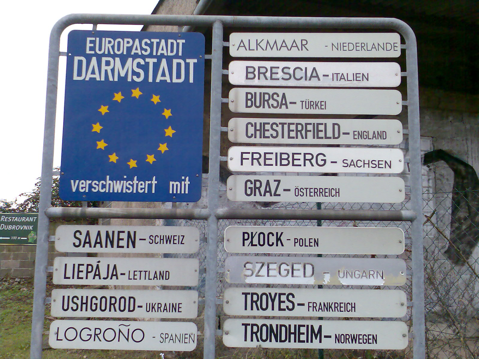 Städtepartnerschaften der Wissenschaftsstadt Darmstadt.